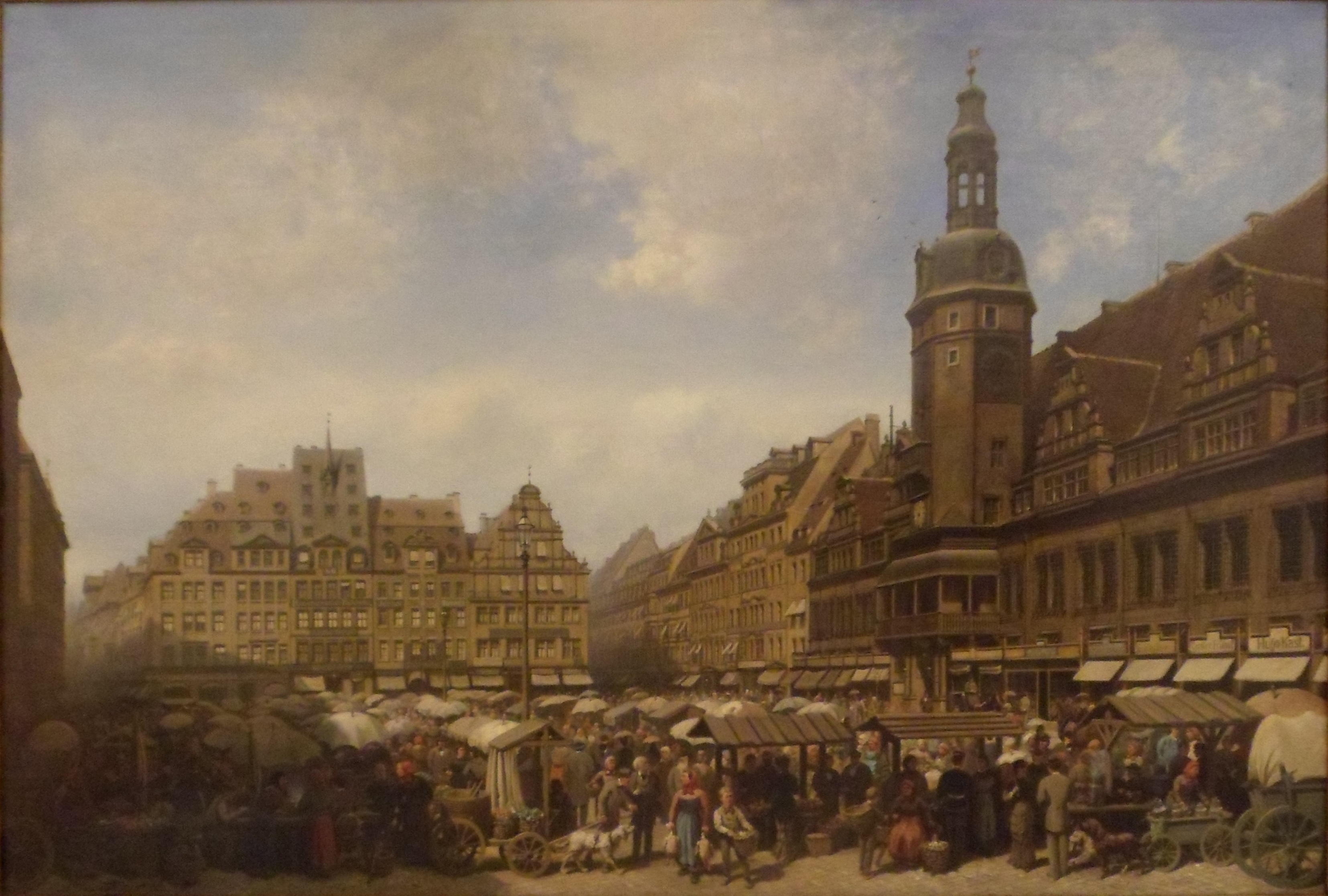 La plaza del Mercado, Leipzig - 1882 Fotografía del cuadro tomada en el museo Soumaya por Jespa